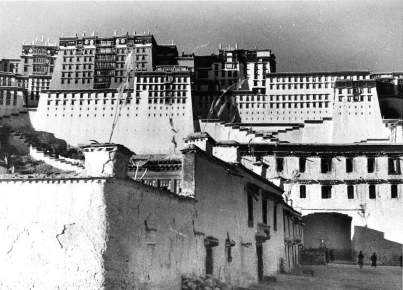 Lhasa, Eingangstor mit Potala